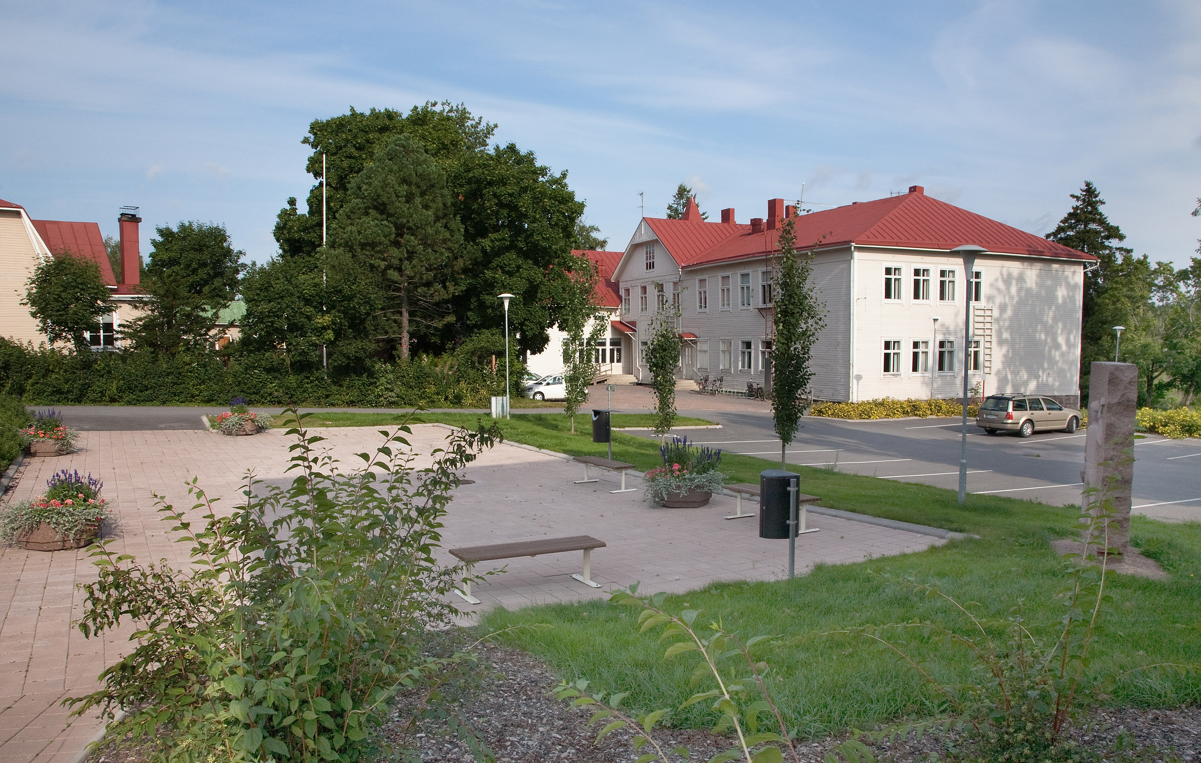 Kokemäen vanha yhteiskoulu. Kuva Tulkkilantieltä.